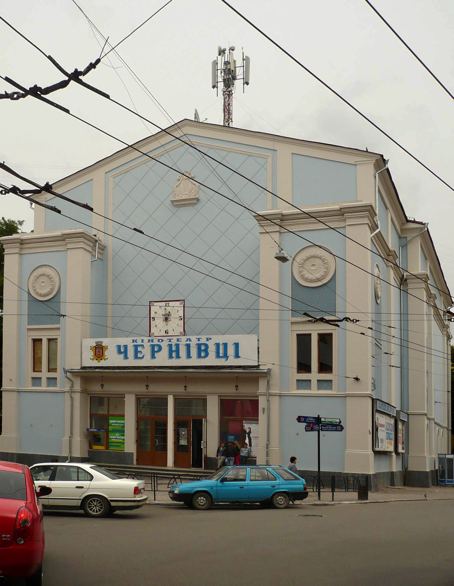 Czerniowce, synagoga, 2009 r.